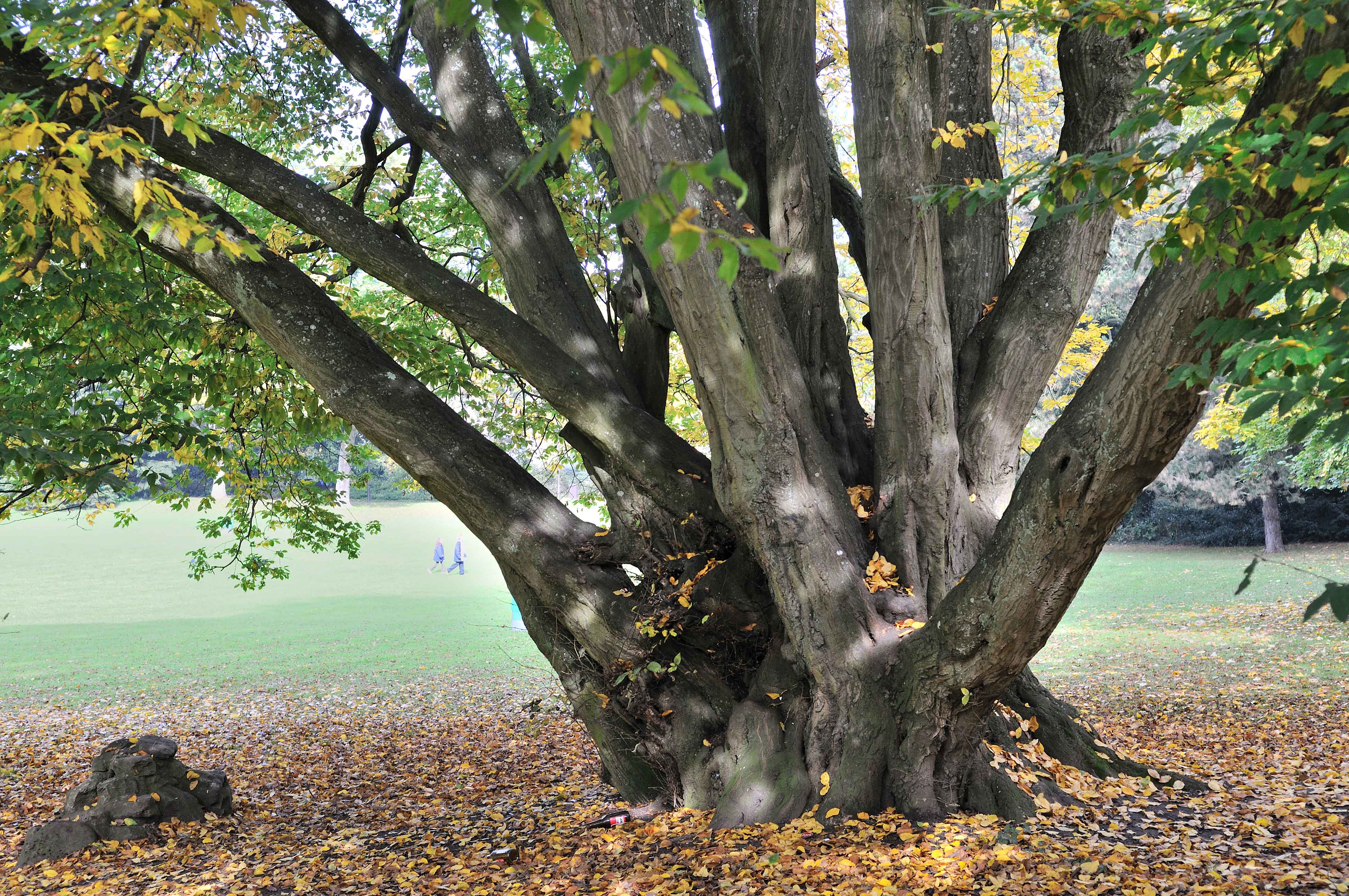 Le charme classé arbre remarquable sur le site Kinnekswiss (littéralement : pré royal) du parc municipal de Luxembourg-ville.